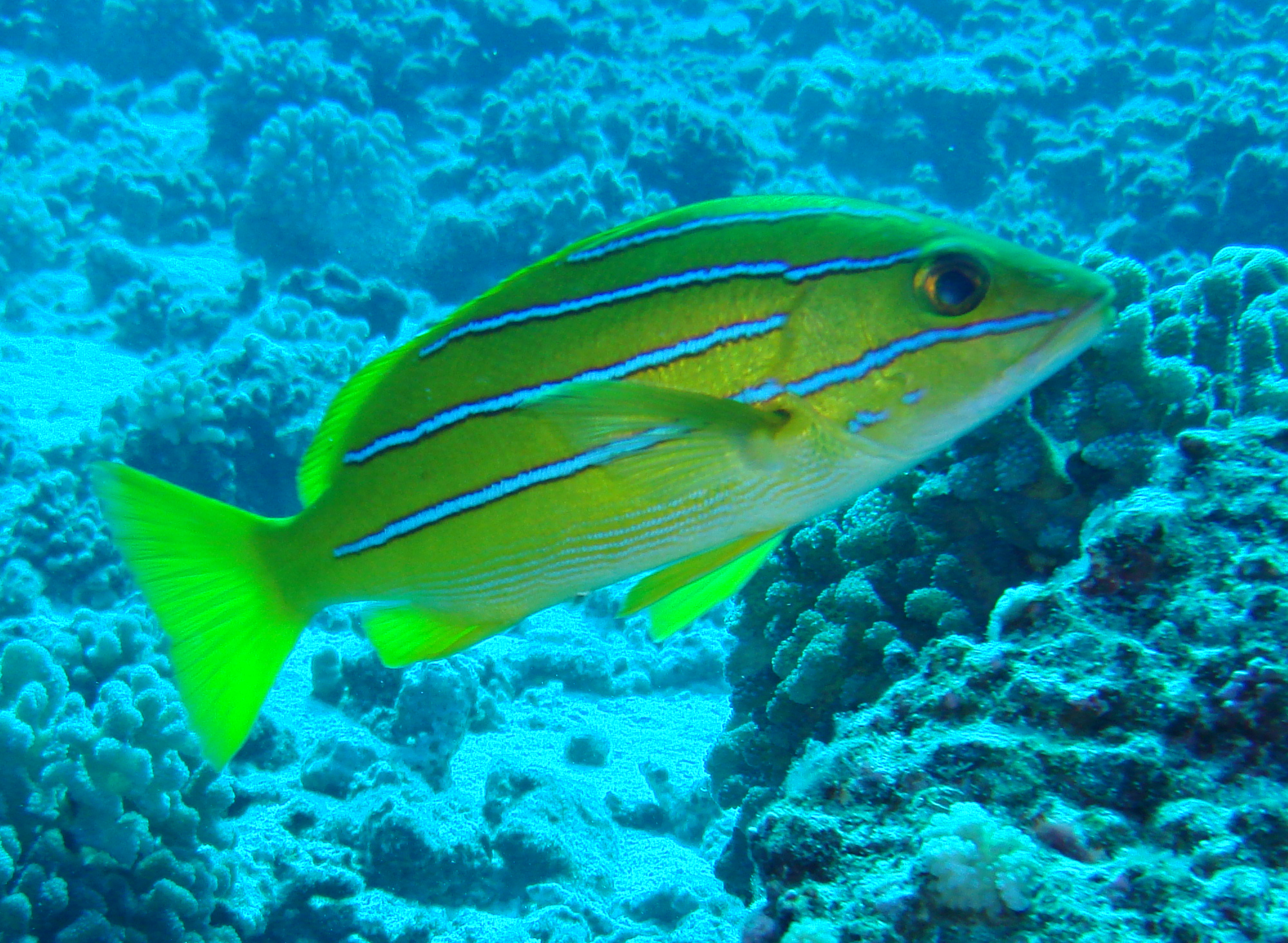 Lutjanus kasmira